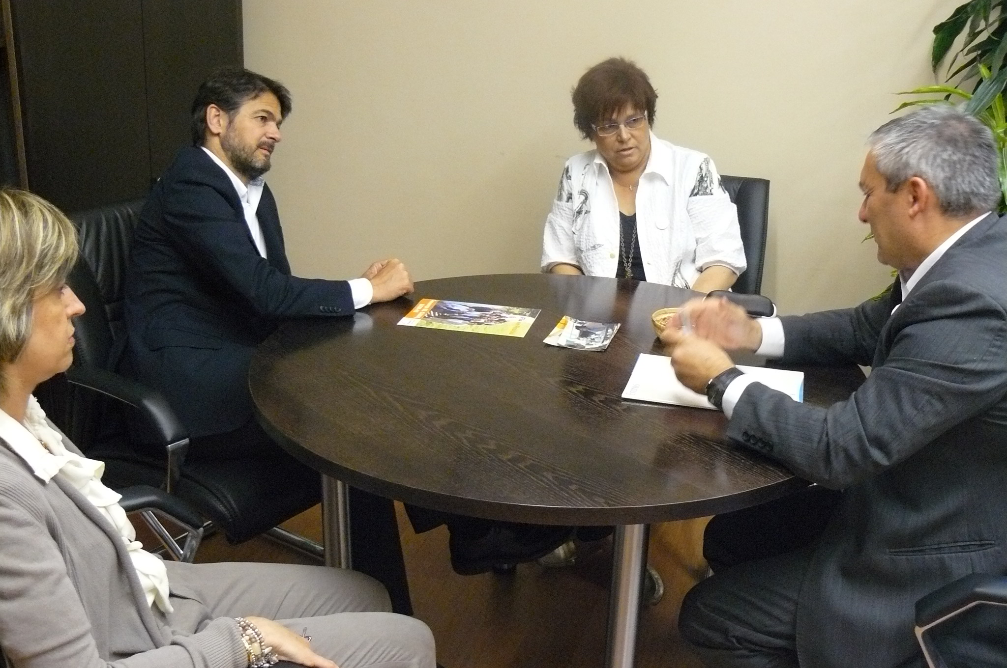 Municipals2011 O.Pujol reunió amb ERcross a Flix.